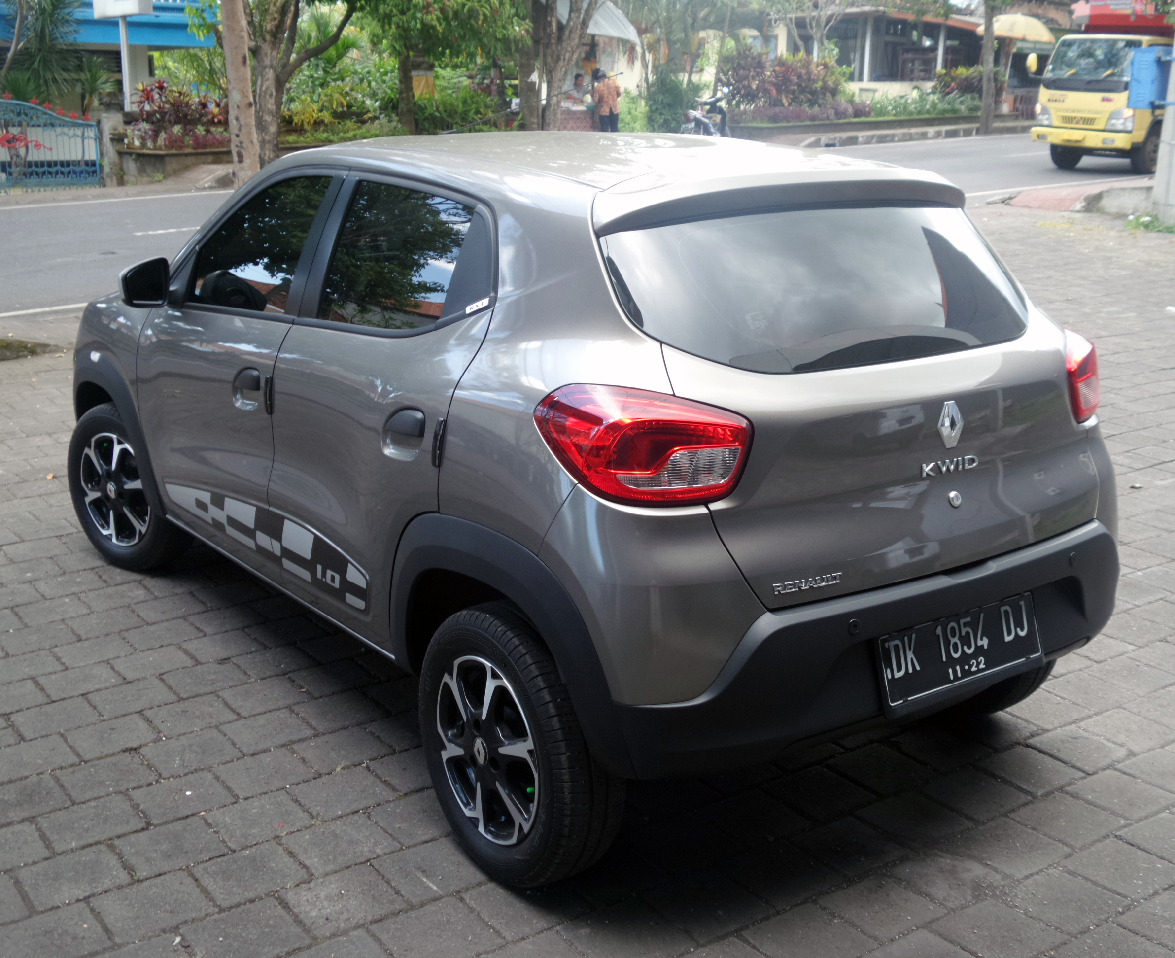 Hatchback murah Renault Kwid di Jalan Untung Surapati, Karangasem, Bali. Walau dijual di Indonesia dengan harga menyaingi mobil LCGC, sayang jarang yang minat.